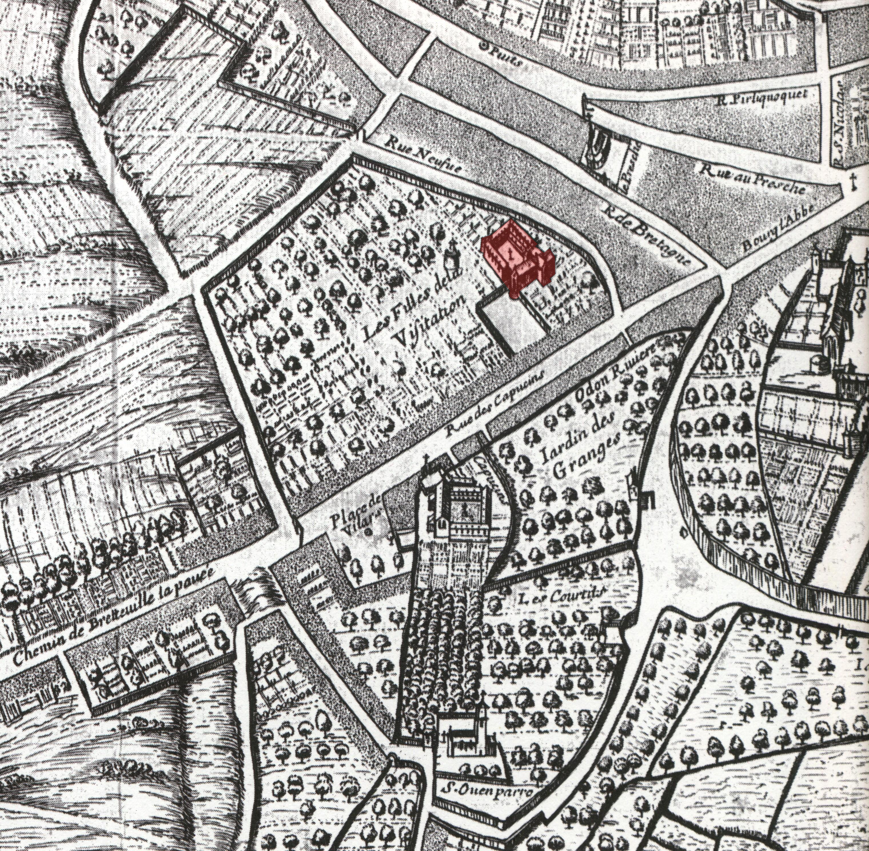 monastère de la Visitation (en rouge) dans les années 1670.